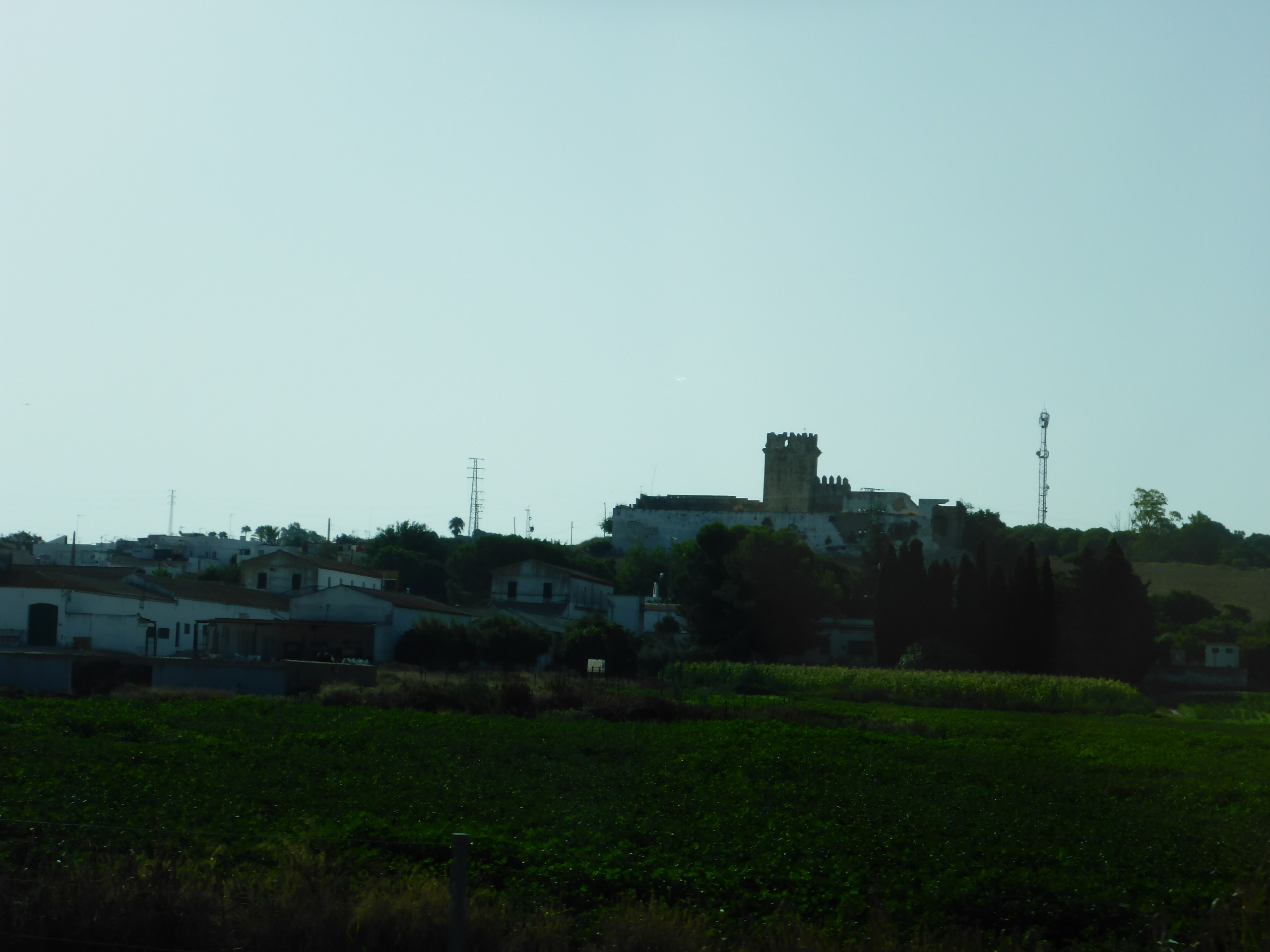 Castillo de Melgarejo